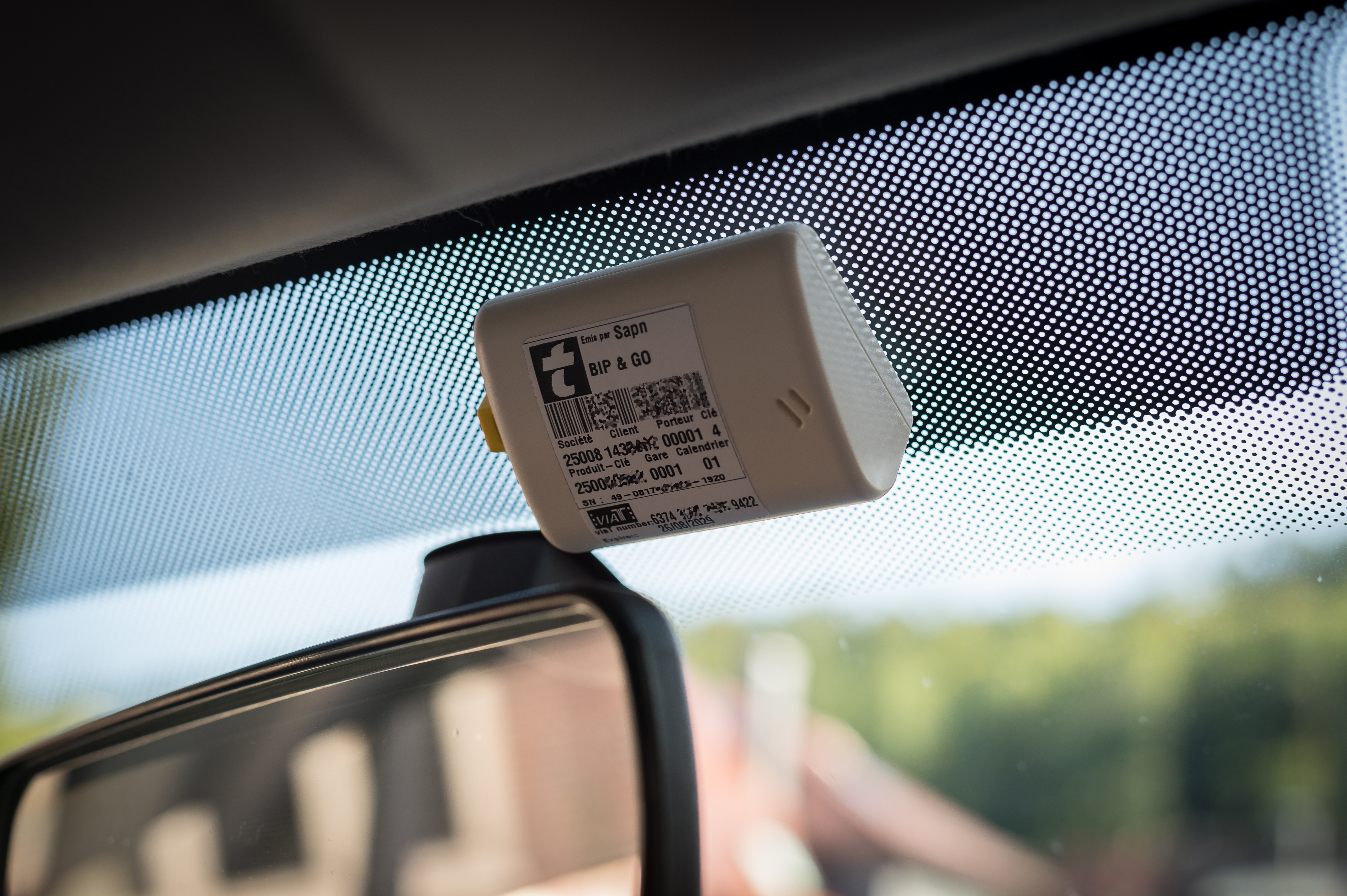 Transponder Bip&Go Télépéage zur elektronischen Mauterfassung auf Autobahnen in Frankreich, Spanien, Portugal und Italien.